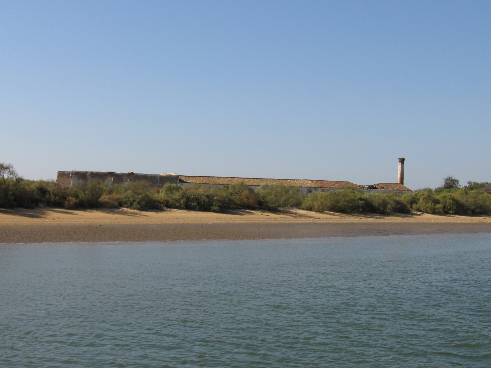 Ruinas del Real Nuevo de la Almadraba de Nueva Umbría (Lepe)